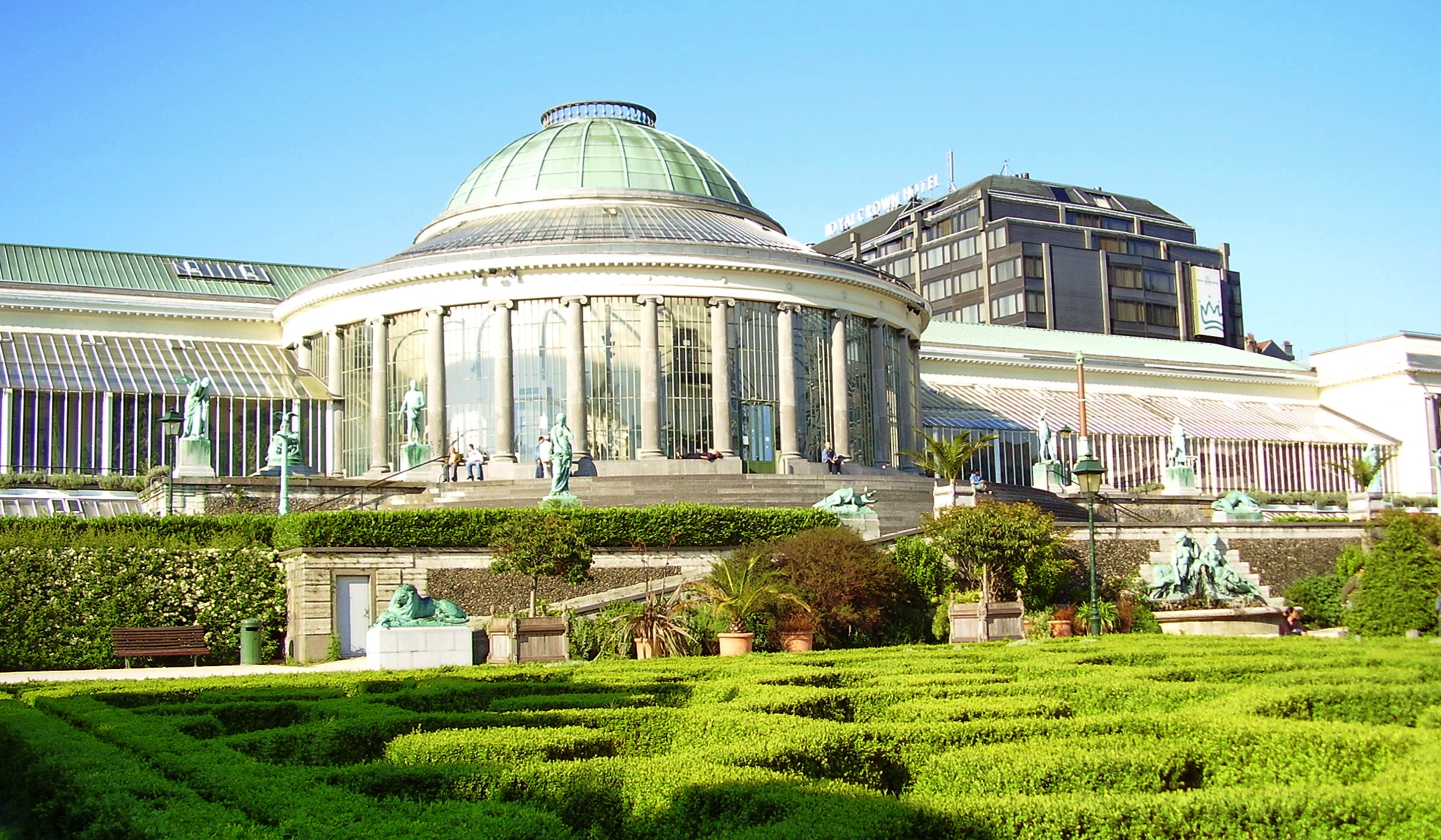 Description: Le Botanique, Saint-Josse-ten-Noode (Bruxelles) Author: User:Ben2 Date of creation: 22 juin 2006 Source: Photo personnelle